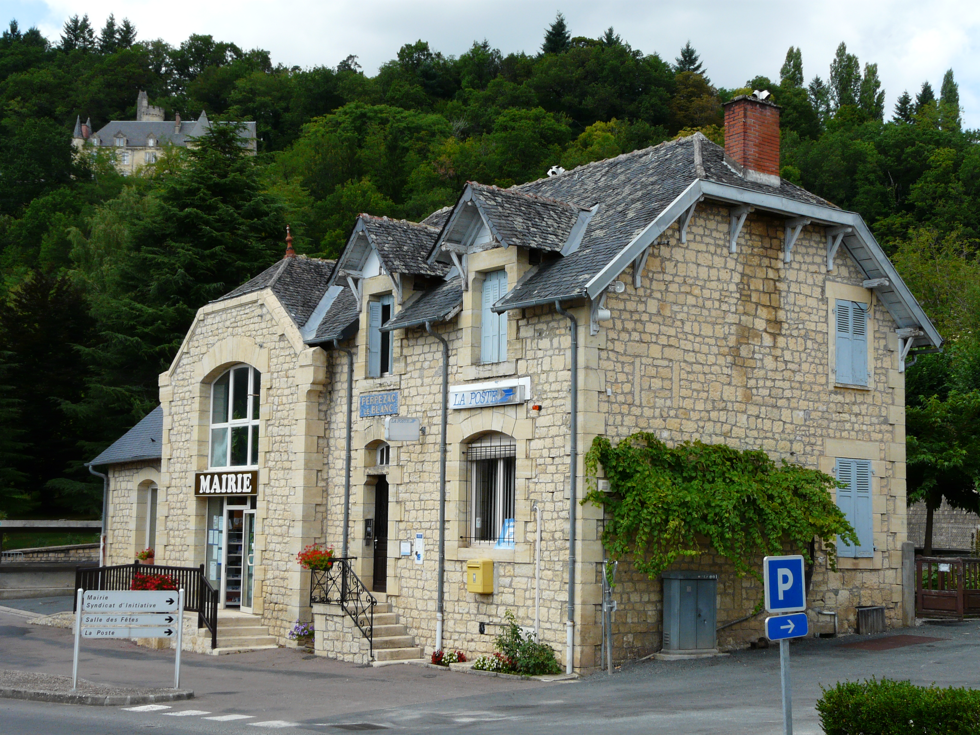 La mairie et le bureau de poste, Perpezac-le-Blanc, Corrèze, France.